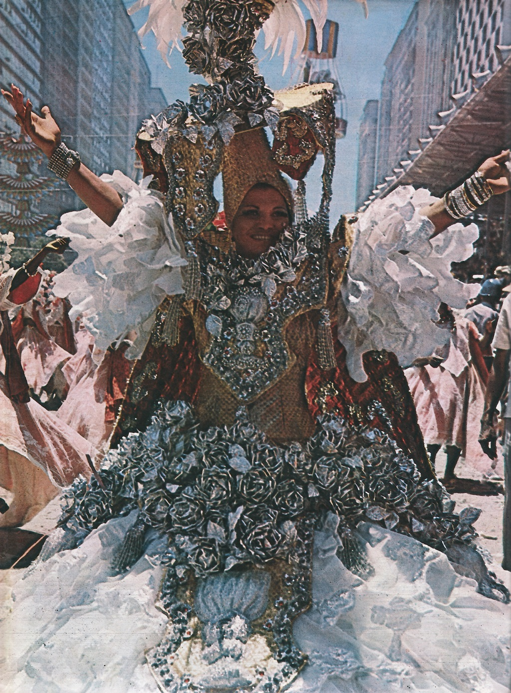 Acadêmicos do Salgueiro, 1969